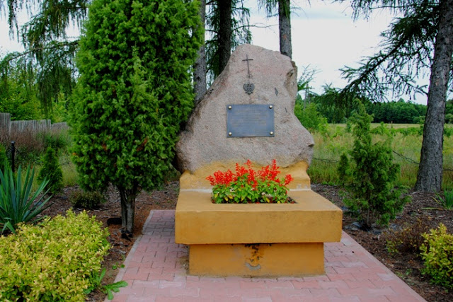 Cis - Obelisk upamiętniający pamięć Marianny Cel ps. Tereska